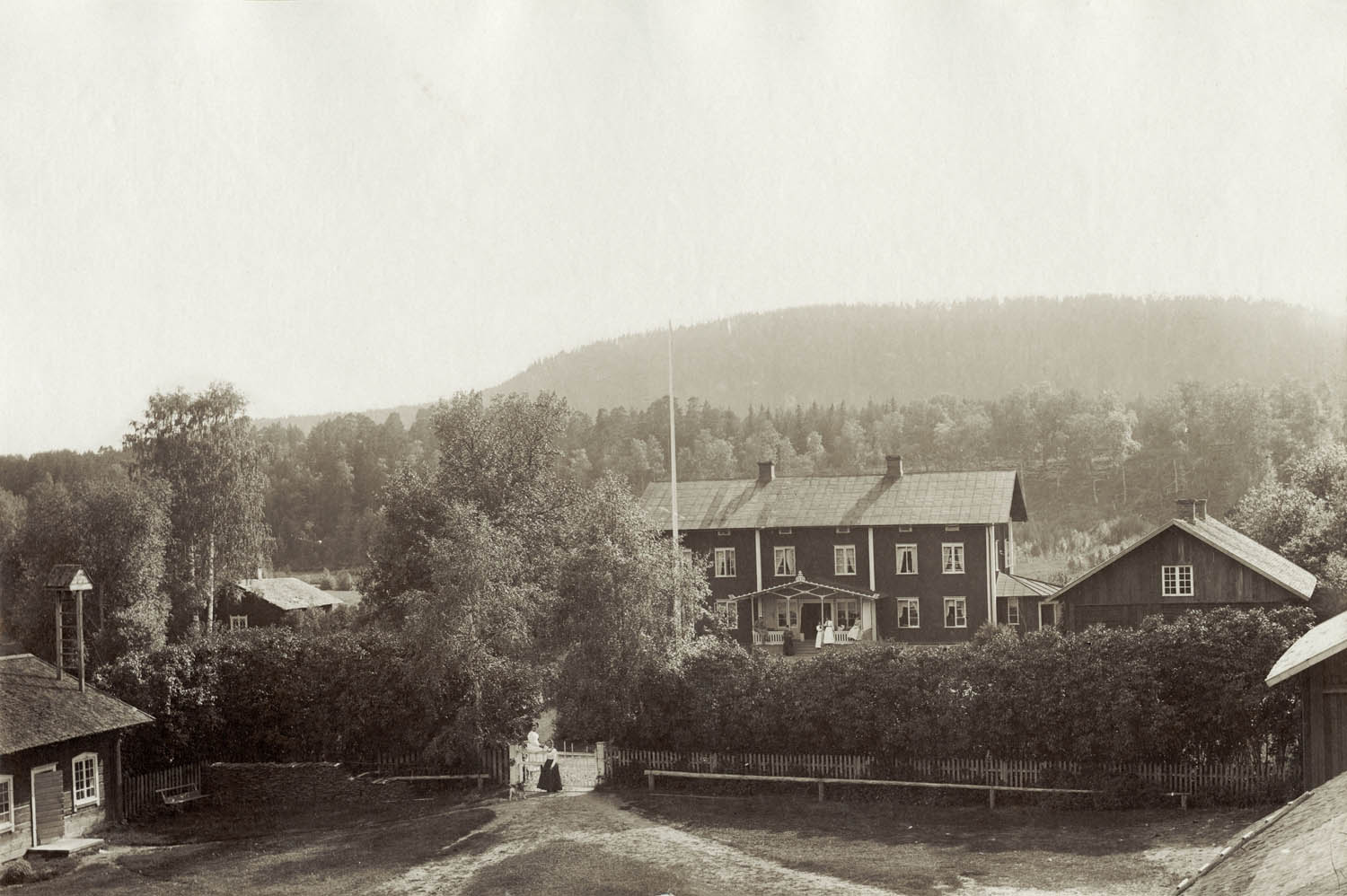 depicted place: Värmland, Älvdals hd, Ekshärad (Sverige (SE))